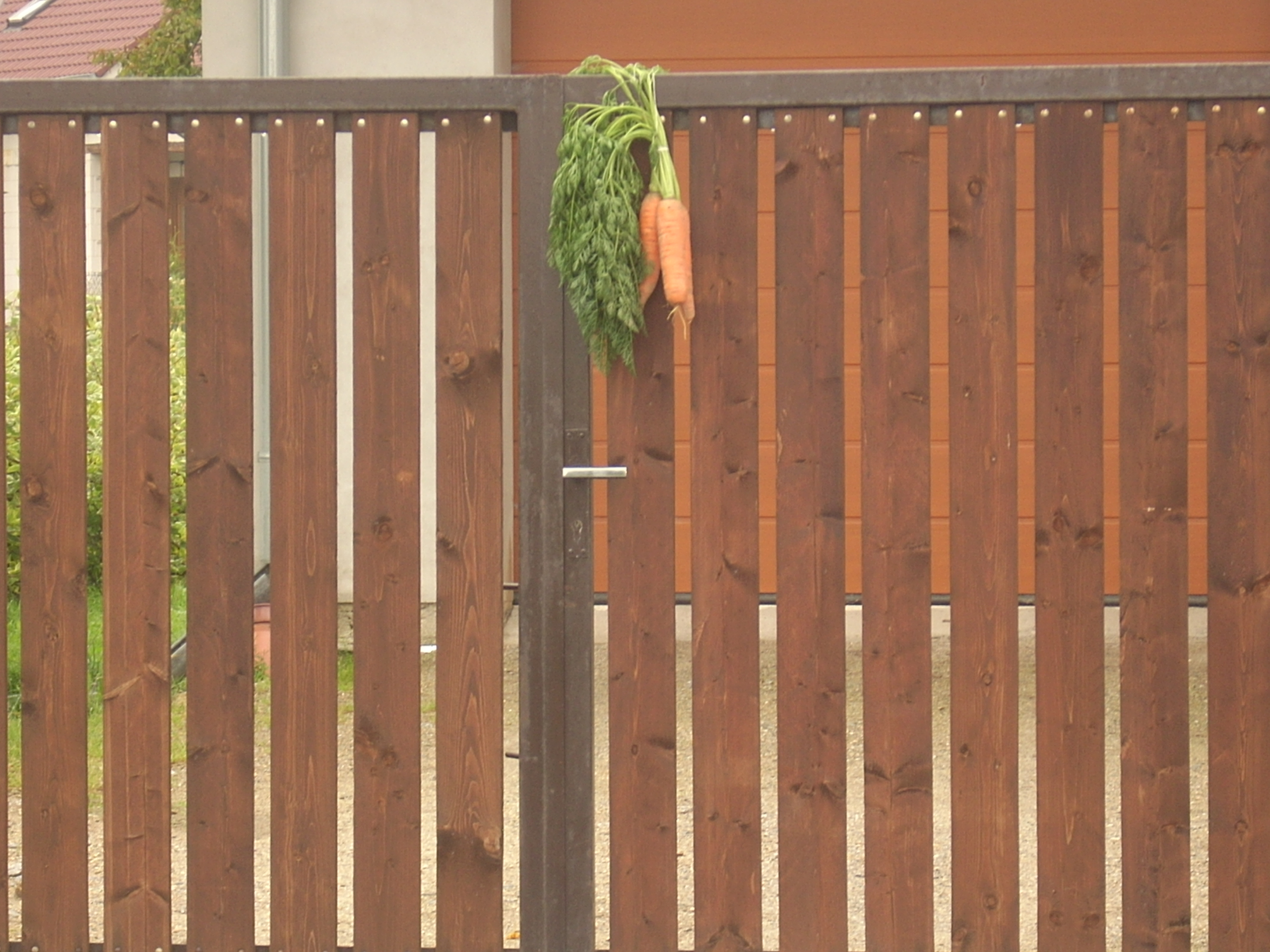 Polna Mrkvancova pout, výzdoba